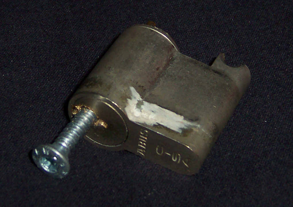 Ein mit dem Ziehfix herausgebrochener Schließzylinder samt eingedrehter Spezialschraube